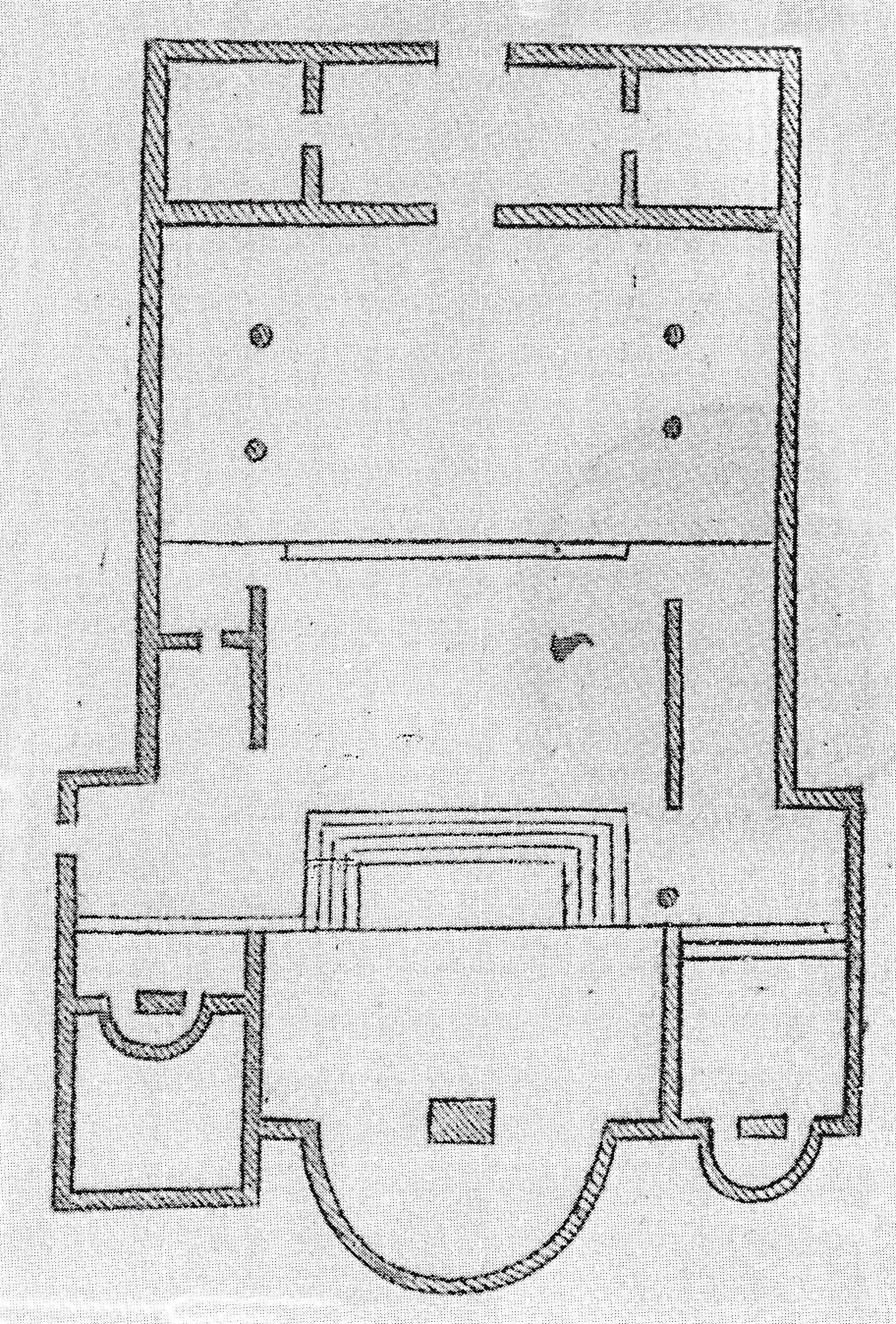 Interno della Abbazia di San Salvatore a Spugna, Colle Val d'Elsa